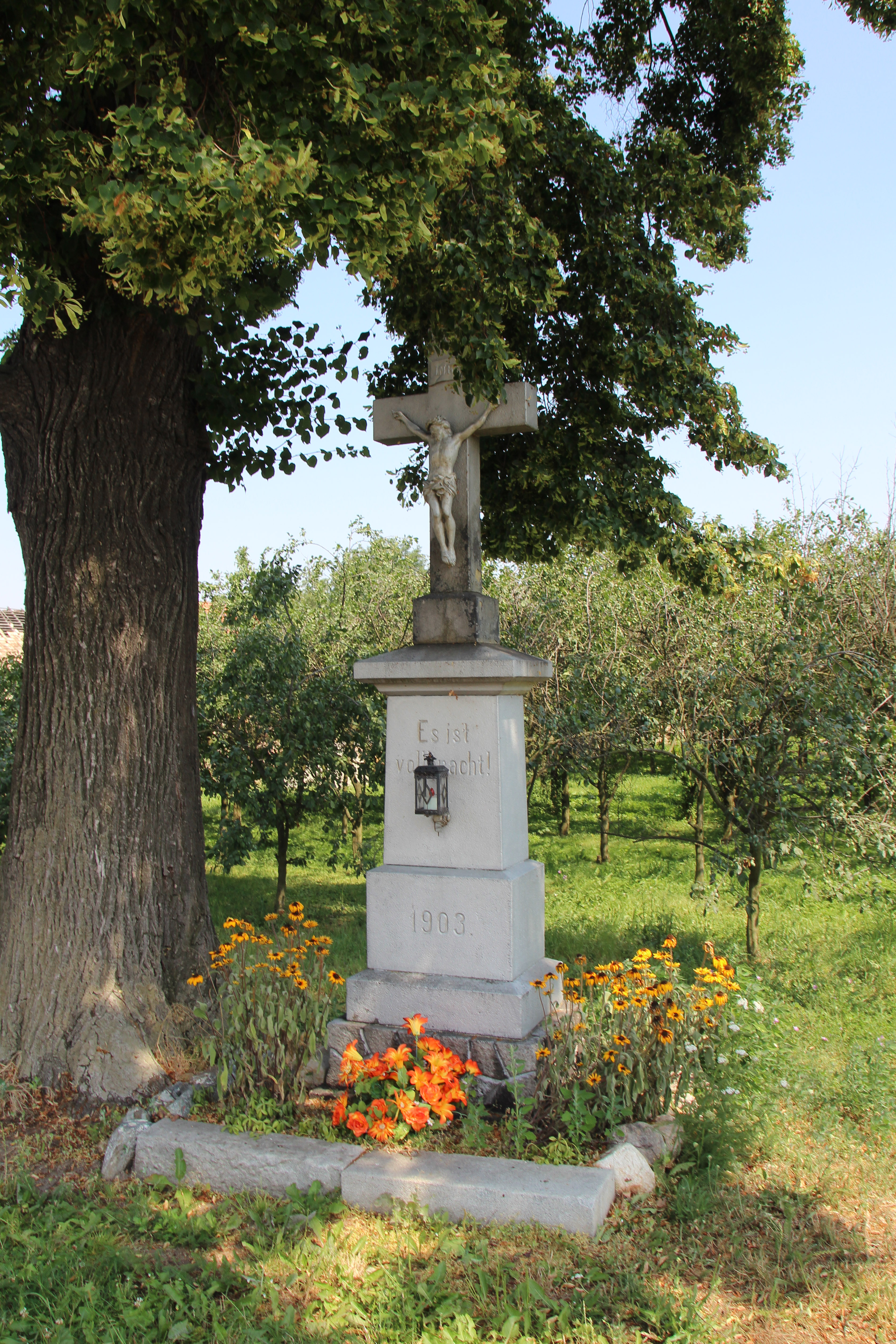 Dziewiętlice (Pruský Jindřichov, Heinersdorf) – wieś w Polsce, w województwie opolskim, w powiecie nyskim, w gminie Paczków.